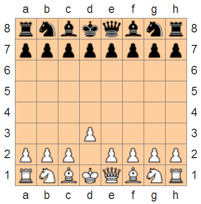 Dames de cour jouant aux échecs. Nevasi Lal (?). Реконструкция позиции на картине